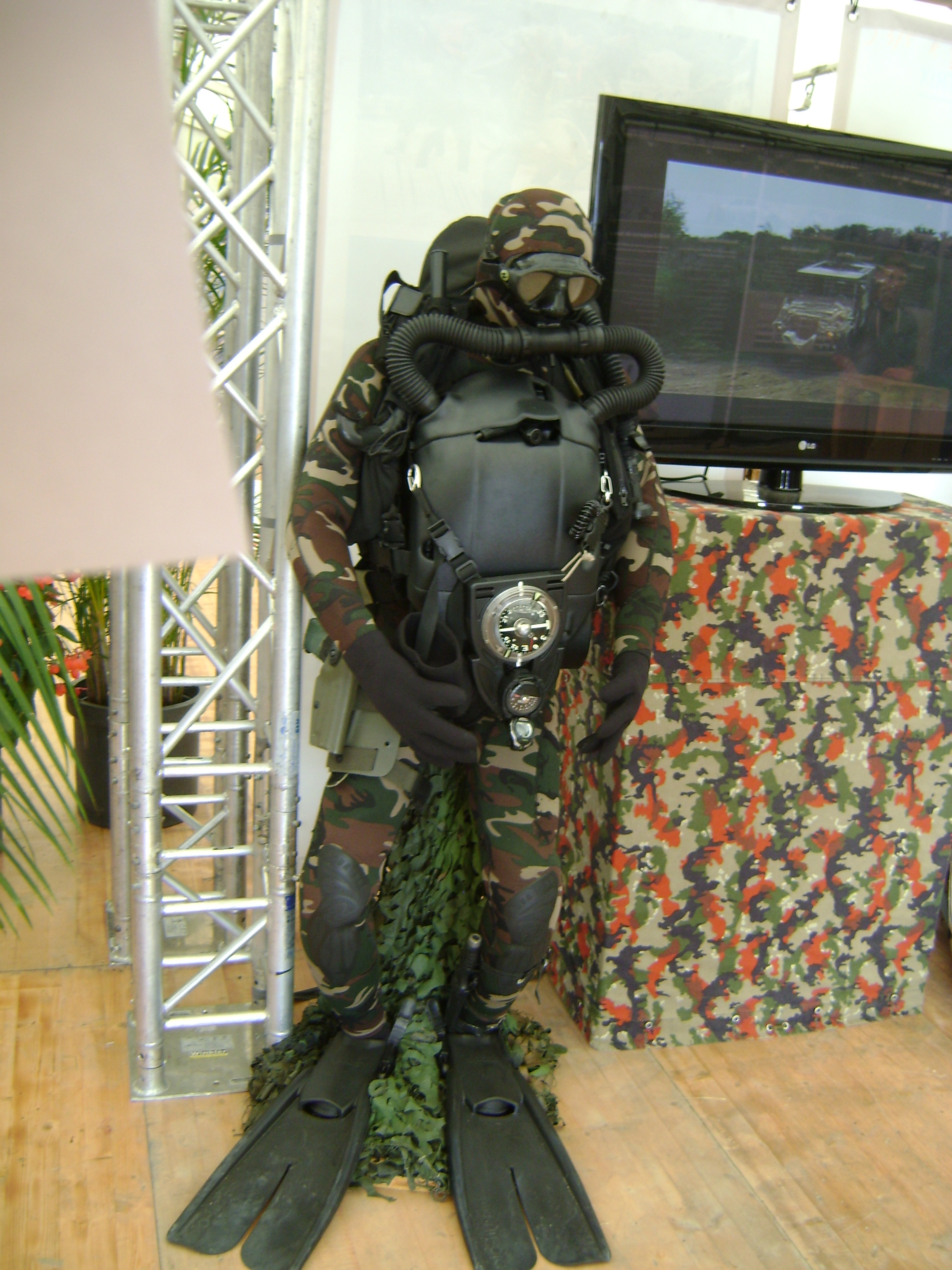 KSK Taucher